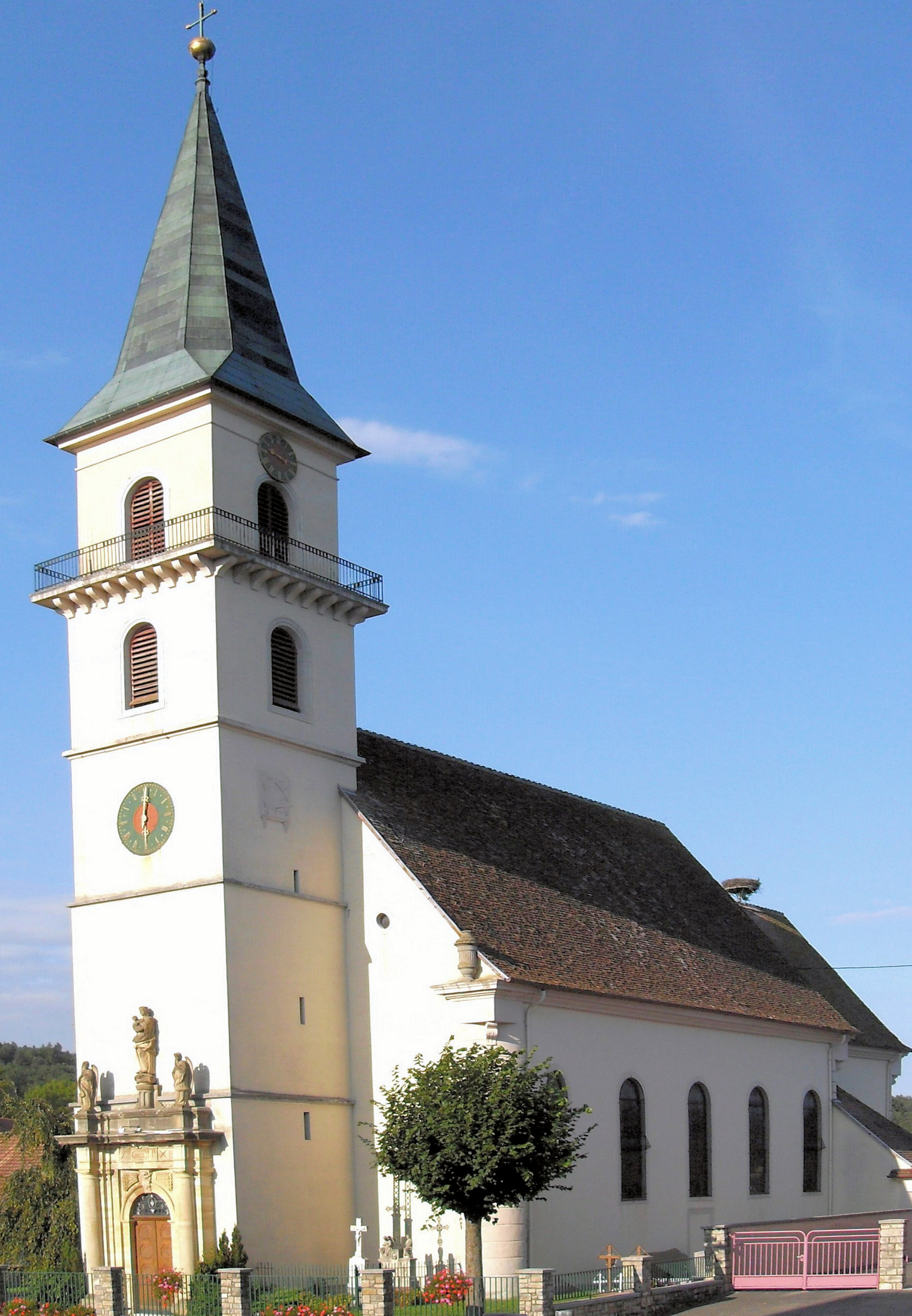 L'èglise Saint-Étienne à Raedersdorf